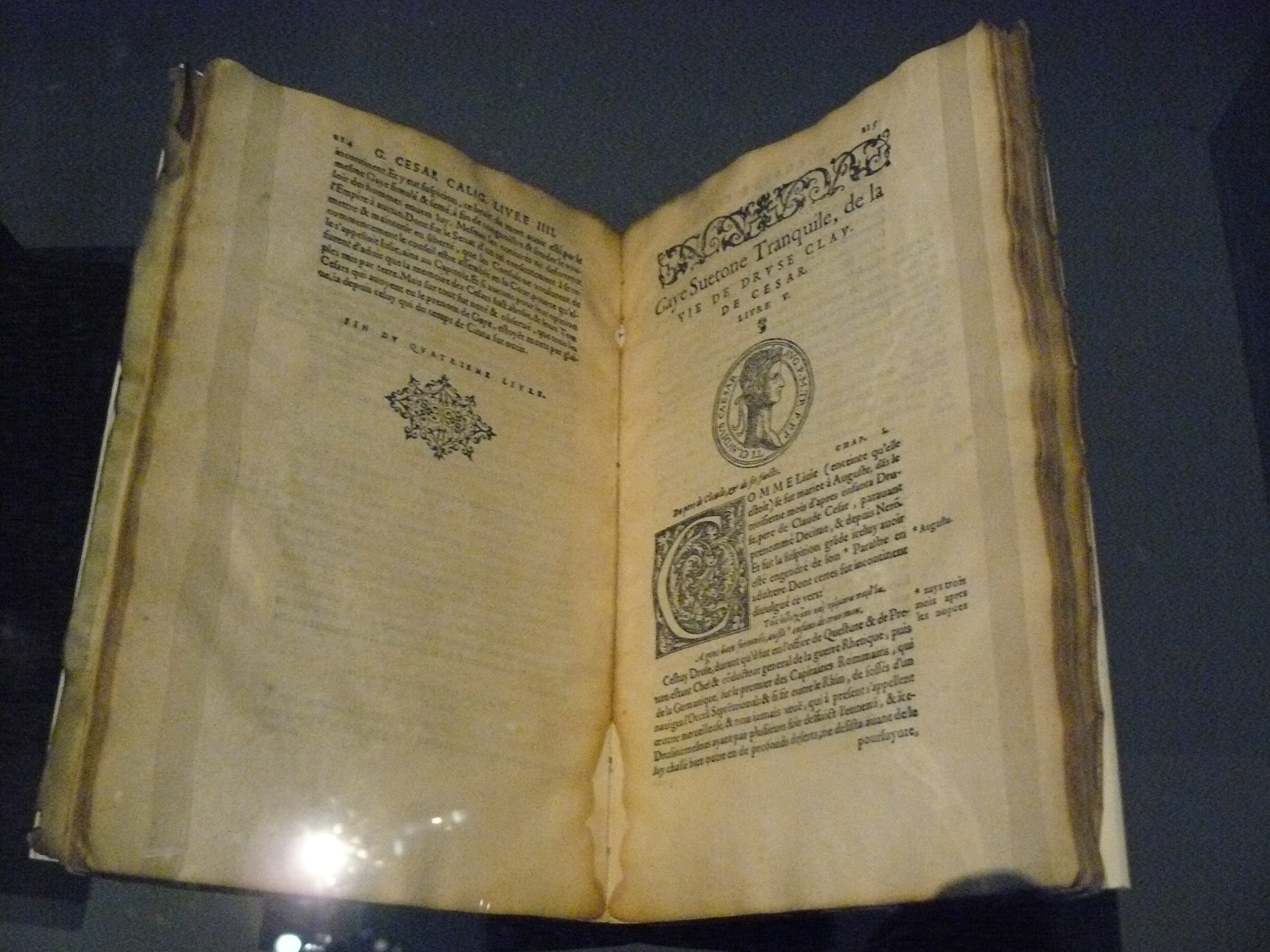 Vie des XII Césars de Suétone. Edité à Lyon en 1569. Livre exposé durant l'exposition Claude, un empereur au destin singulier au MBA Lyon, catalogue p 110.